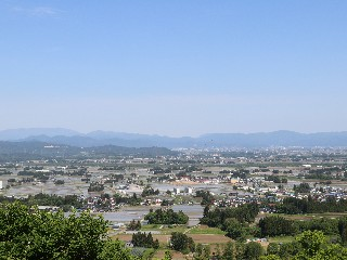 春